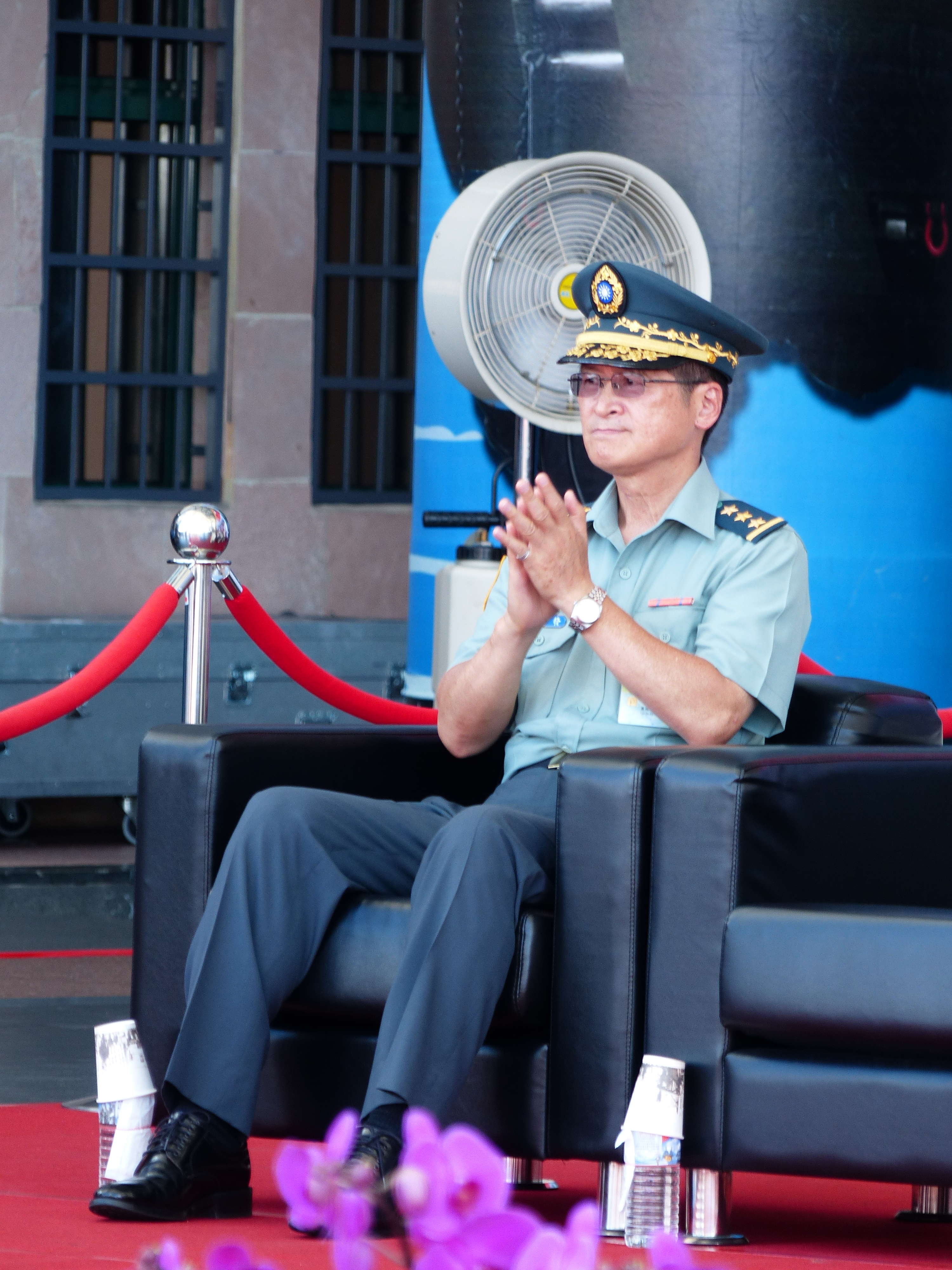 出席國軍人才招募新北市宣導活動的陸軍司令二級上將嚴德發。